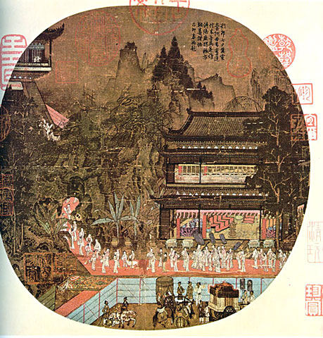 [宋] 赵伯驹 汉宫图 立轴绢本设色画 直径24.5厘米 来自